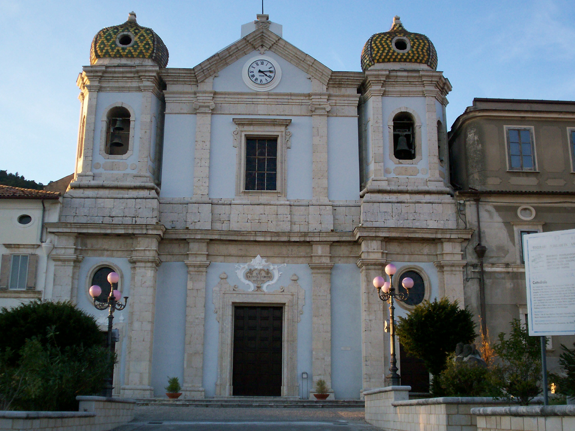 Prospetto della Cattedrale della Santissima Trinità in Cerreto Sannita (Bn)